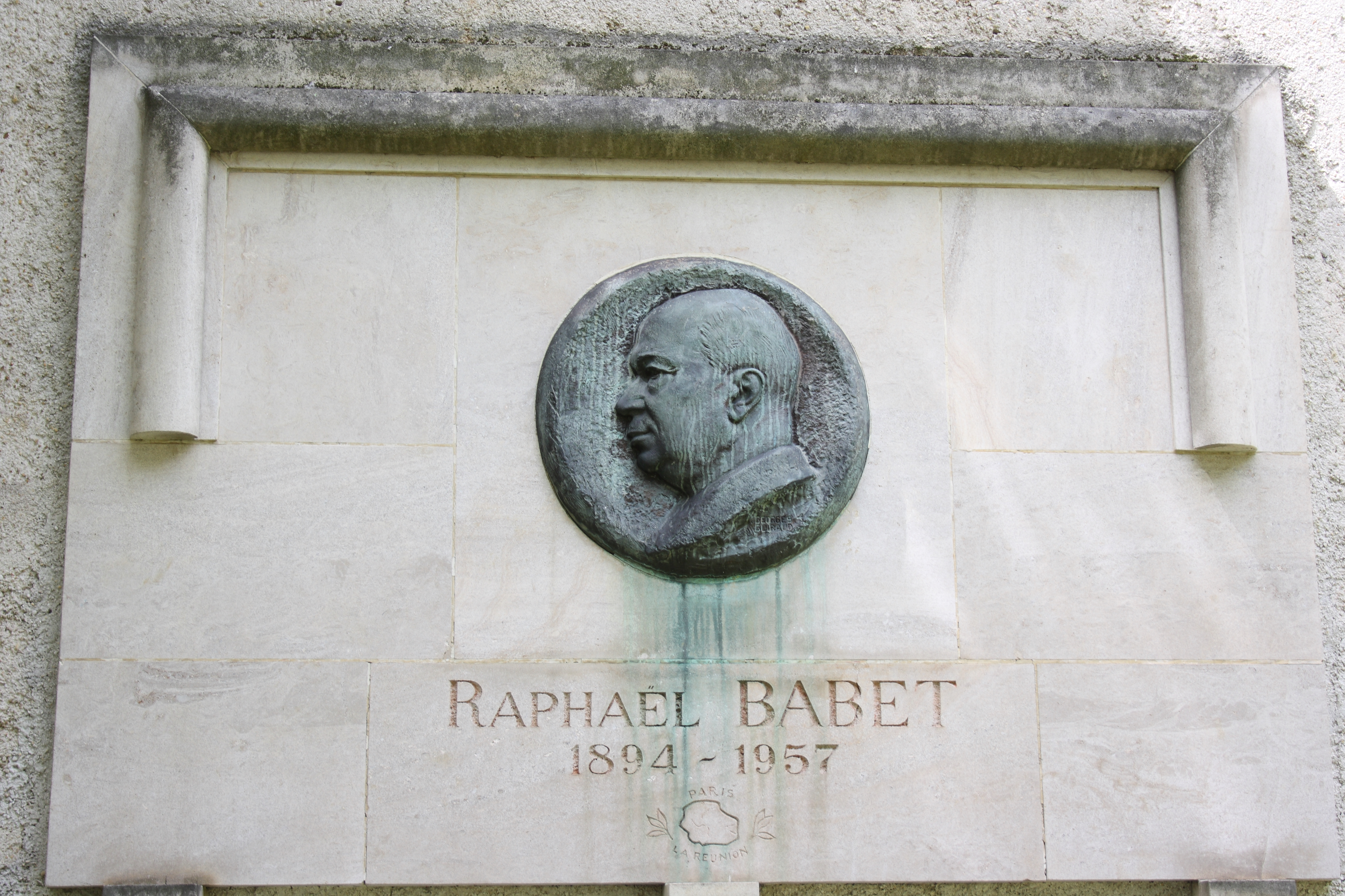 Denkmal für Raphaël Babet im Square d`Alleray in Paris (15. Arrondissement)